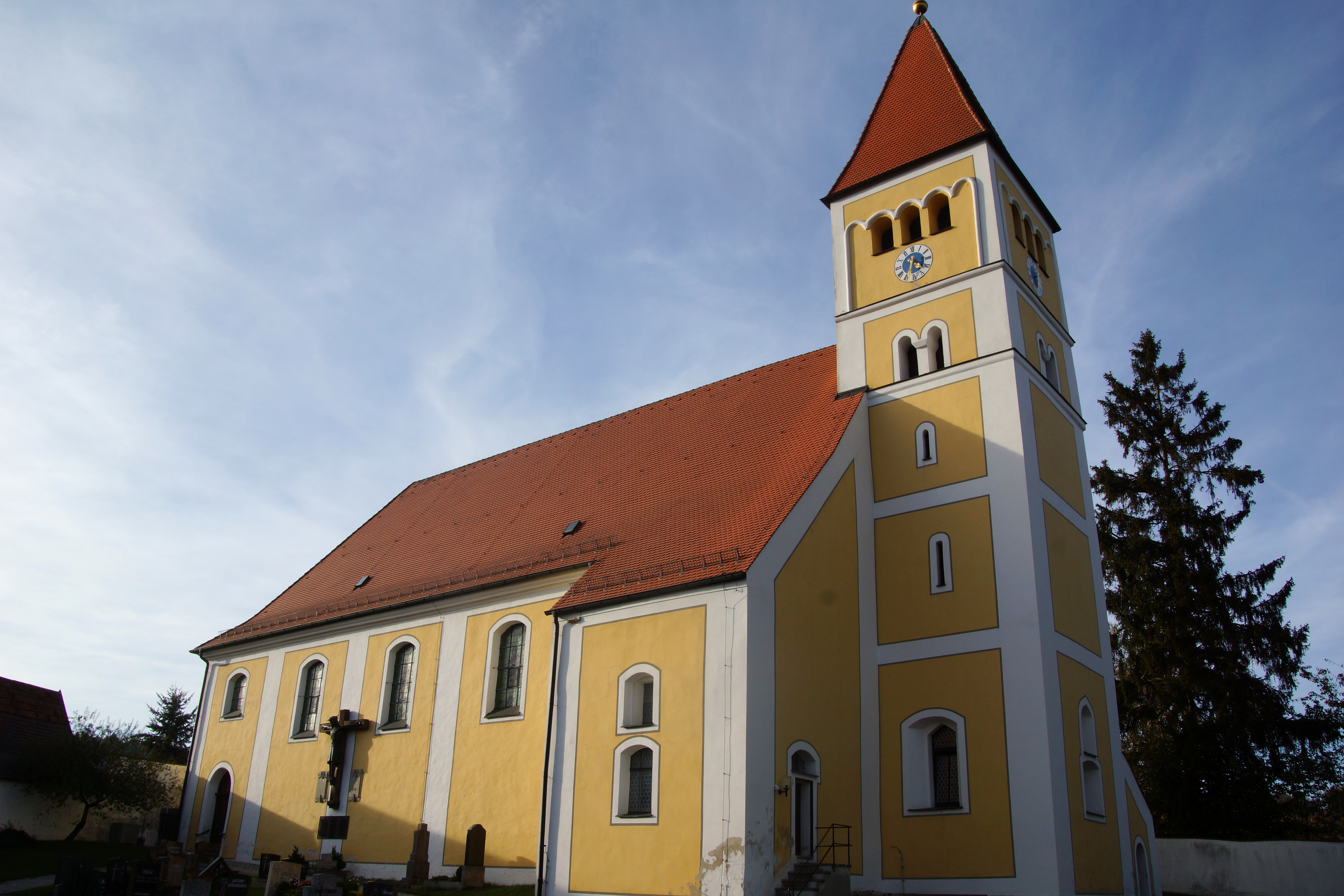 Die Simultan-Pfarrkirche St. Vitus in der Oberpfälzer Gemeinde Illschwang